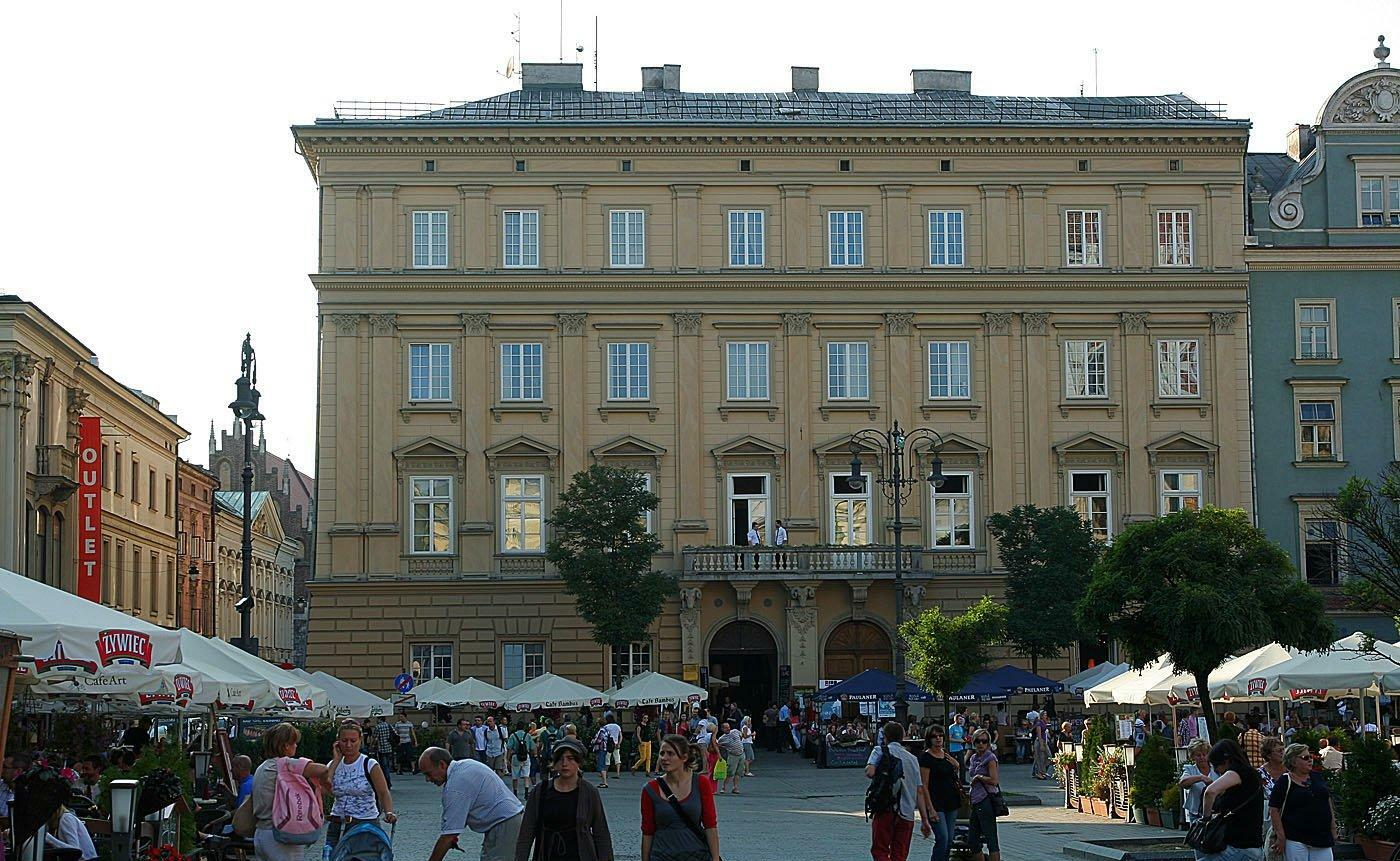 Pałac Pod Baranami